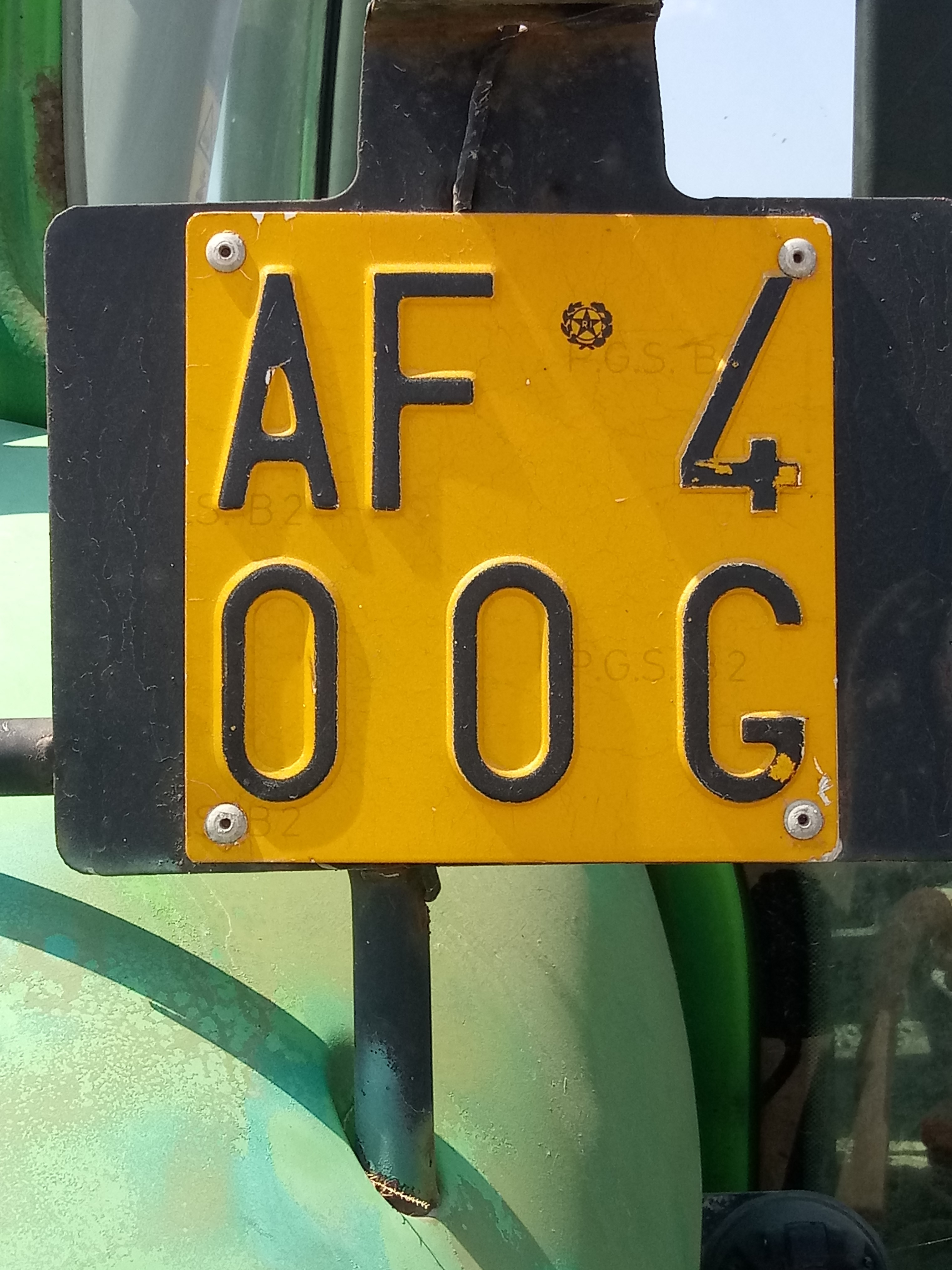 La foto, scattata sulla spiaggia dell'Isola Verde (VE), rappresenta la targa di un trattore con il formato in uso dal 1985 per macchine agricole immatricolate in Italia; la serie alfanumerica è del tipo "AA 000A"; i caratteri sono neri su fondo giallo.